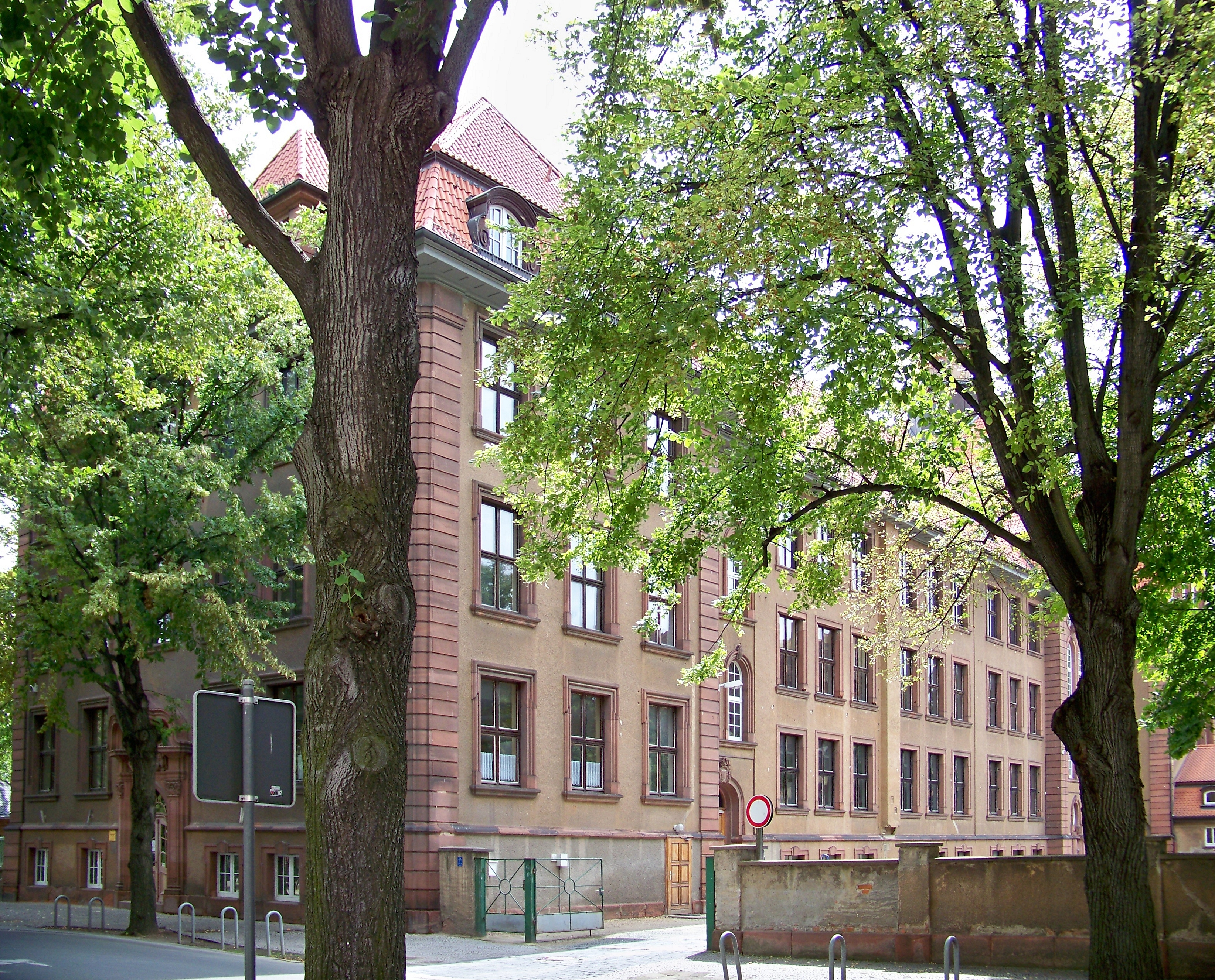 Goethegymnnasium in Weißenfels